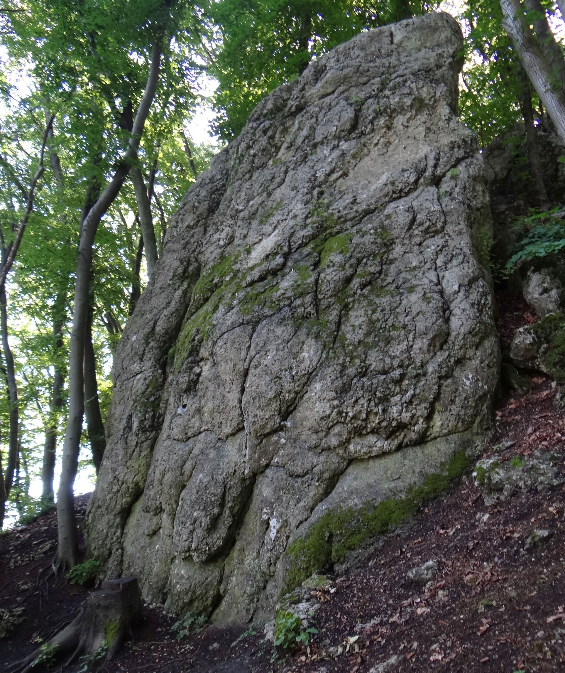 Plaskolec w Lesie Zabierzowskim w Kochanowie